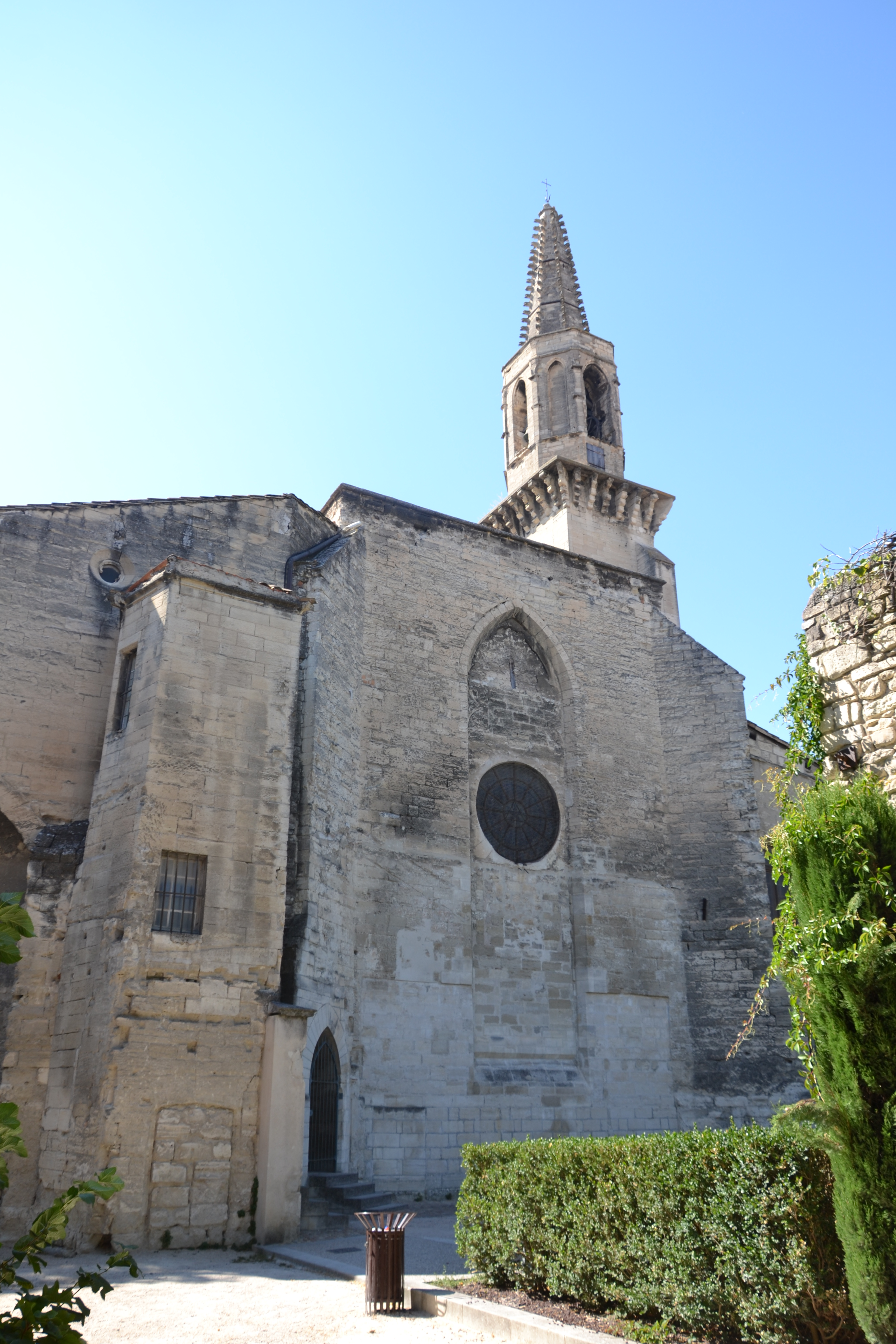 abside Église Saint-Symphorien d'Avignon